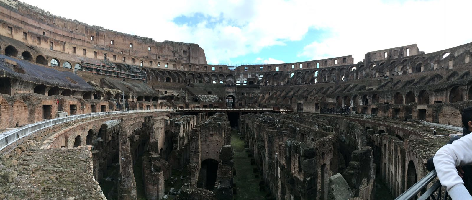 El Coliseo es sin duda uno de los grandes atractivos turísticos de Roma. Ha sido llevado al cine en múltiples ocasiones, destacando sobre todo la reconstrucción digital mostrada en la película Gladiator. En 1980, la Unesco declaró el centro histórico de Roma, incluido el Coliseo, Patrimonio de la Humanidad.10 Desde 2000, las autoridades mantienen el edificio iluminado durante 48 horas cada vez que en algún lugar del mundo se le conmuta o aplaza una sentencia de muerte a un condenado. Este monumento de la Roma Clásica ha sido designado una de Las Nuevas Siete Maravillas del Mundo Moderno, según la designación honorífica realizada en Lisboa el 7 de julio de 2007, en el marco del concurso New 7 Wonders, organizado por el suizo Bernard Weber, del cual la Unesco se ha desmarcado completamente. El Coliseo fue desalojado el 7 de agosto de 2011 por una alarma de bomba, que resultó inexistente. Una llamada telefónica había informado que había una lata con cables colgando. Según el alcalde de Roma, "Tenía algo de trementina, una batería y dos cables, pero ningún material explosivo".